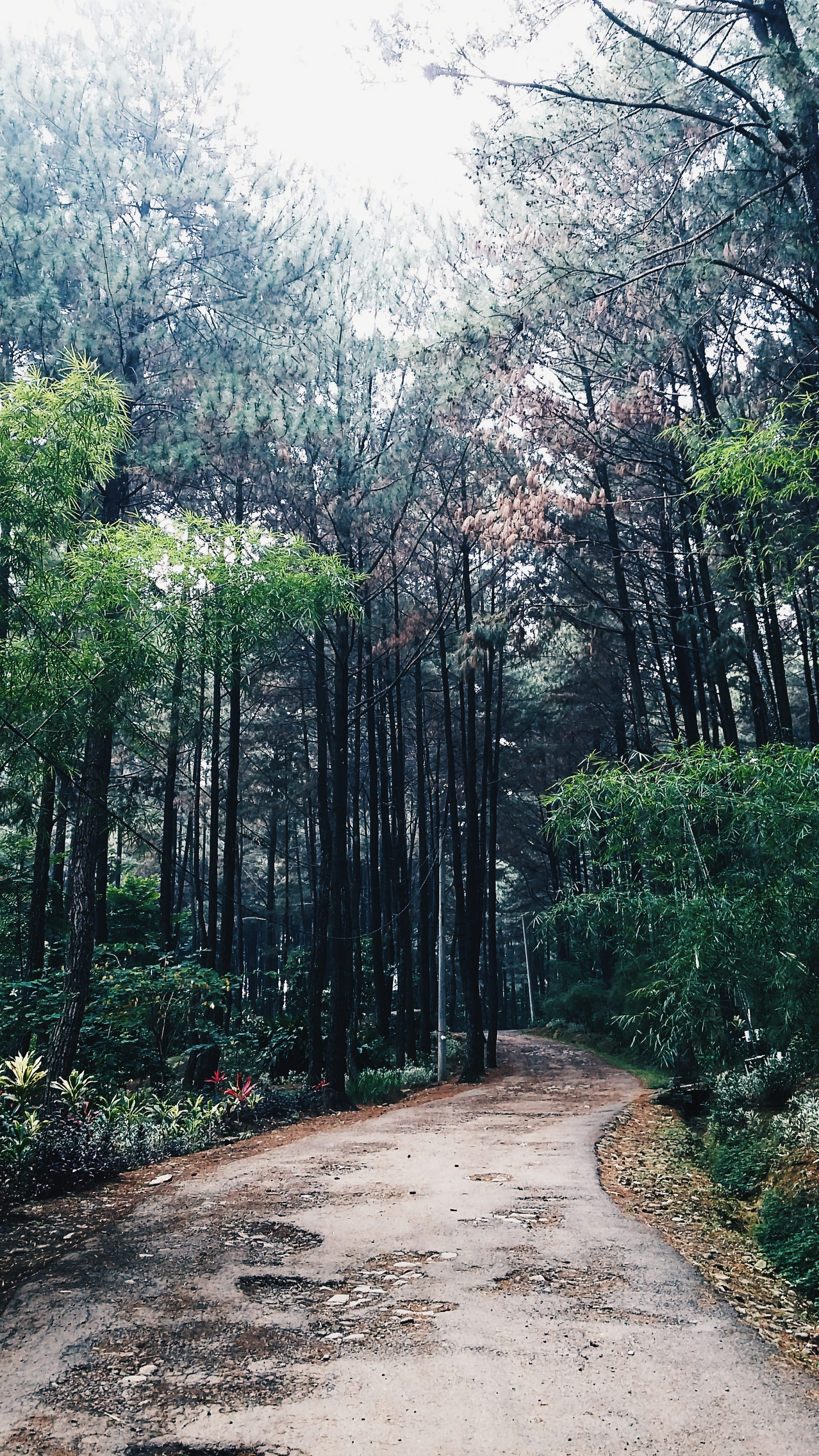 Taman Wisata Alam Gunung Pancar terletak di kawasan Sentul, Bogor, Jawa Barat.